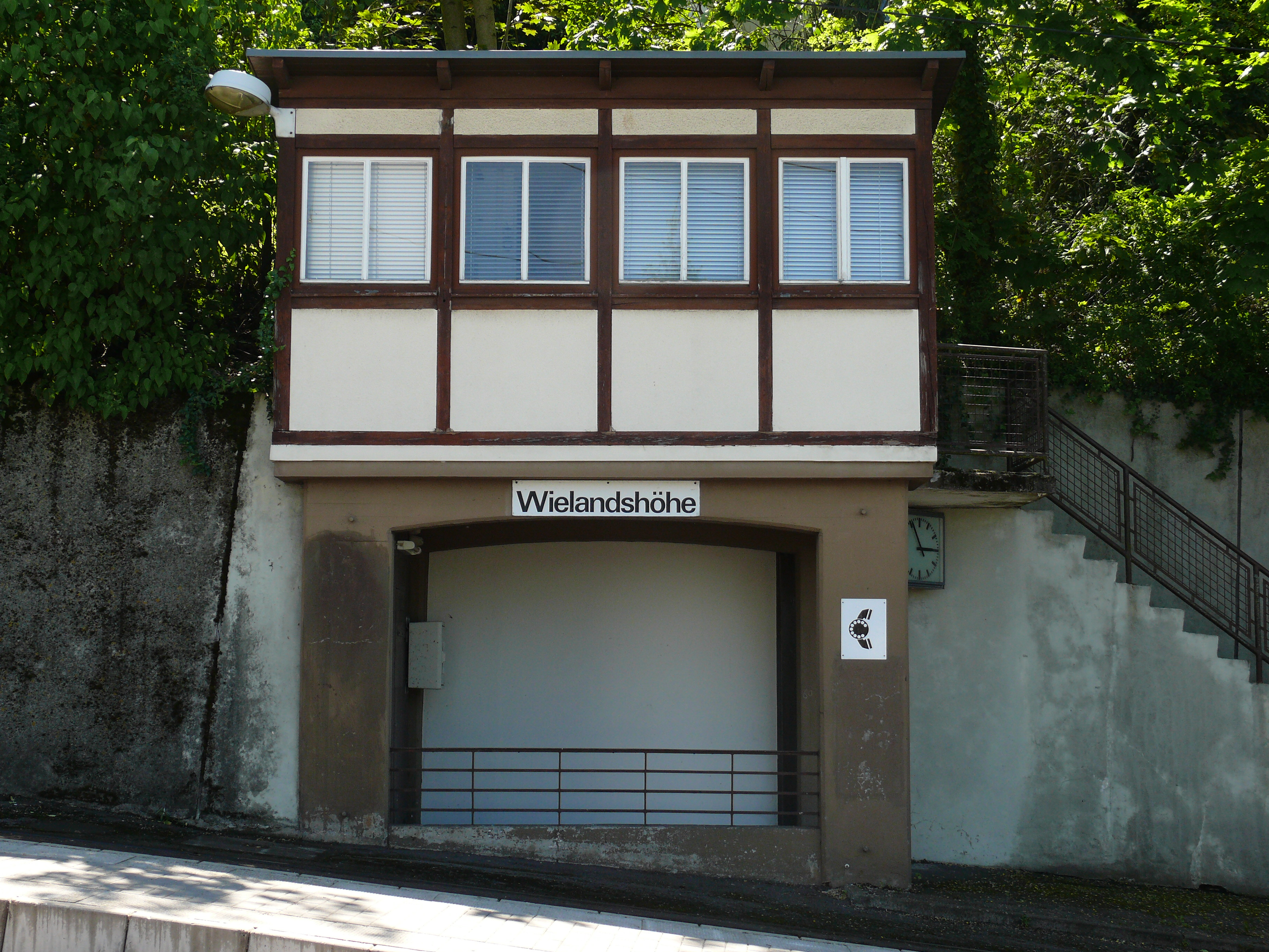 Altes Bahnwärterhaus an der Haltestelle Wielandshöhe der Stuttgarter Zahnradbahn.